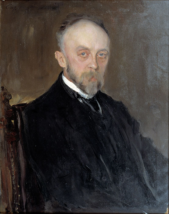 Porträtt av Peter Romanov. Oljemålning på duk, 1901 70 x 56,2 cm Osignerad Inköpt 1938 av fru Romanov Tidigare deponerad av den Baltiska utställningens styrelse 1923. Porträttet föreställer excellensen Peter Romanov, vice finansminister, storfinansiär och konstsamlare. Det är ett typiskt exempel på Serovs psykologiskt intressanta porträtt från runt 1900.